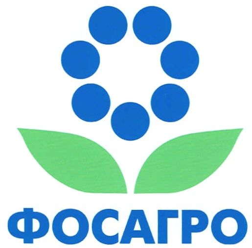 логотип компании Фосагро